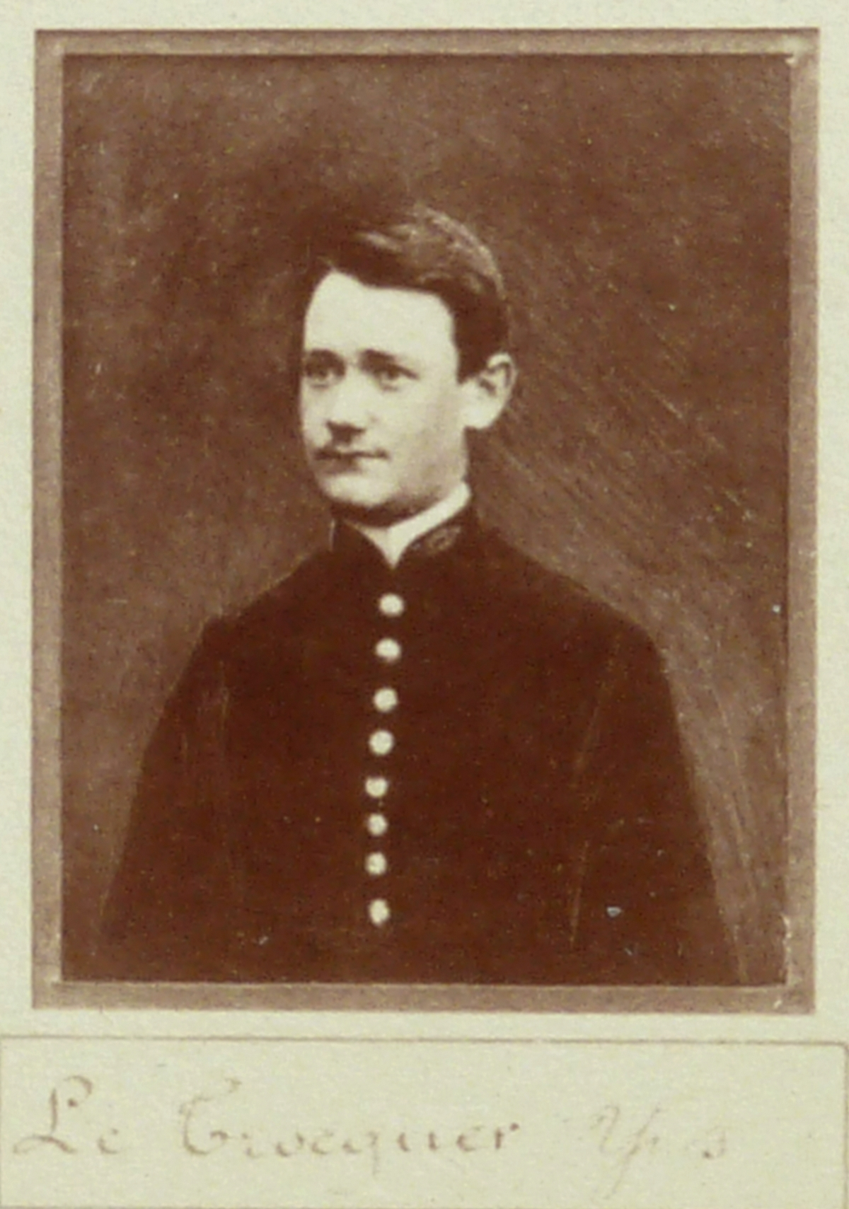 Yves Le Trocquer en 1894, détail d'une photo des élèves du Collège Stanislas. Pierre Petit photographe. Taille du cliché d'origine : 2,5 x 3 cm